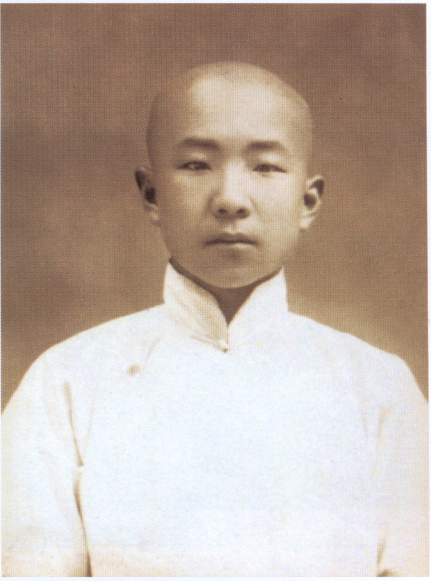 启功（1912年-2005年）中国书法艺术家。此图是他青年时代的照片。